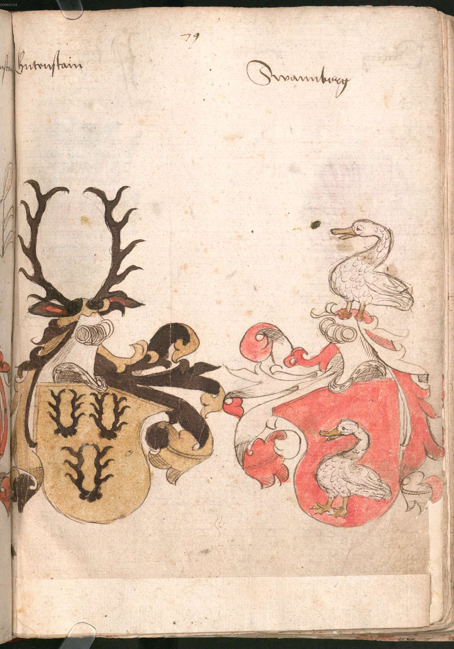 „Wernigeroder (Schaffhausensches) Wappenbuch“; Süddeutschland 4. Viertel 15. Jh. Bayerische Staatsbibliothek München, Cod.icon. 308 n Guttenstein Schwanberg